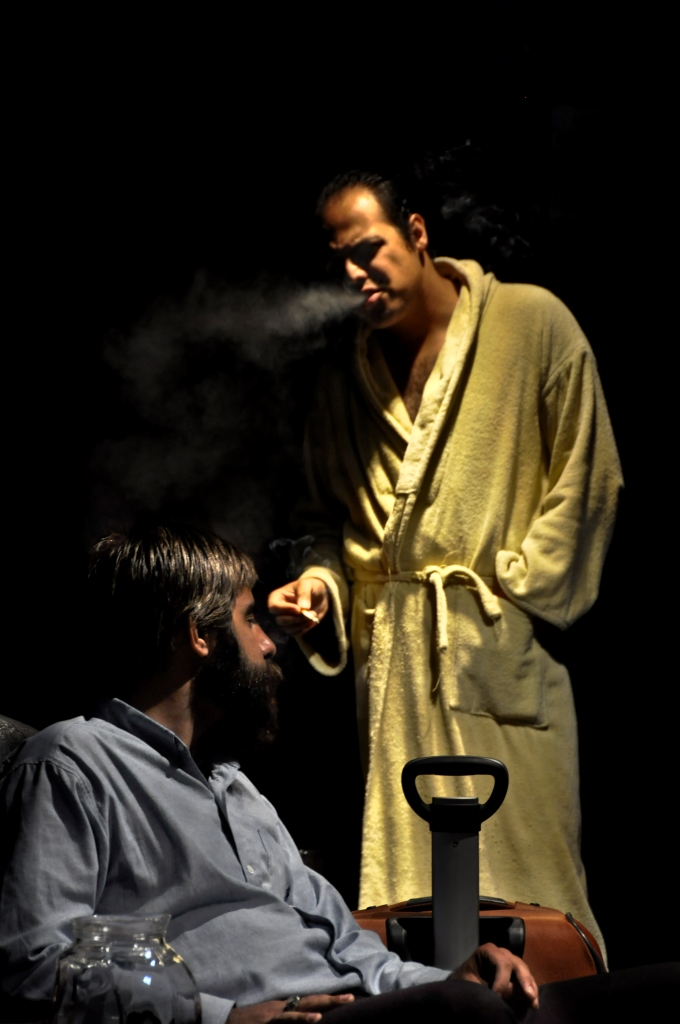 سعید رضا خوش‌شانس و سلمان فرخنده در نمایش زندگی دیگران